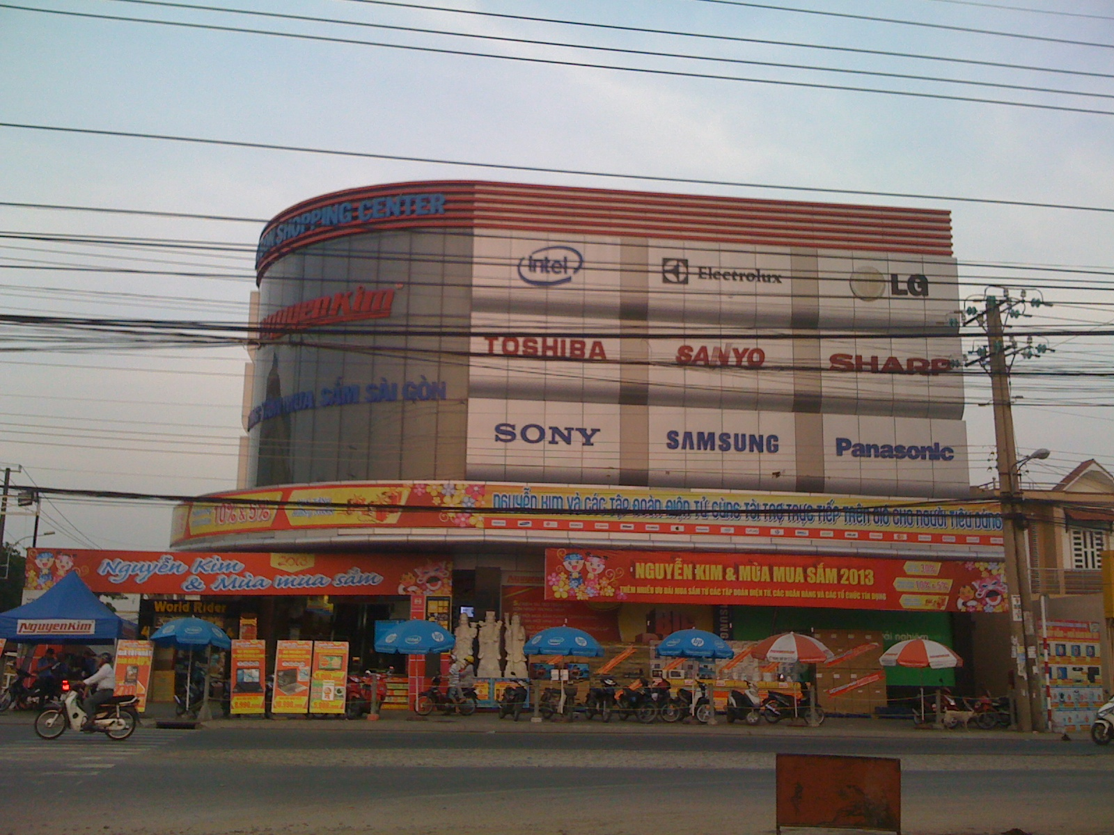 trung trâm điện máy nguyễn kiêm